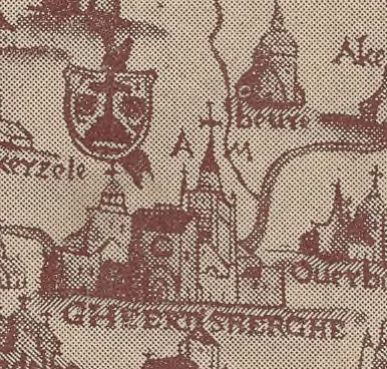 Detail van De Charte van Vlaendren uit 1538, door Pieter van der Beke getekend: Geraardsbergen met wapenschild.